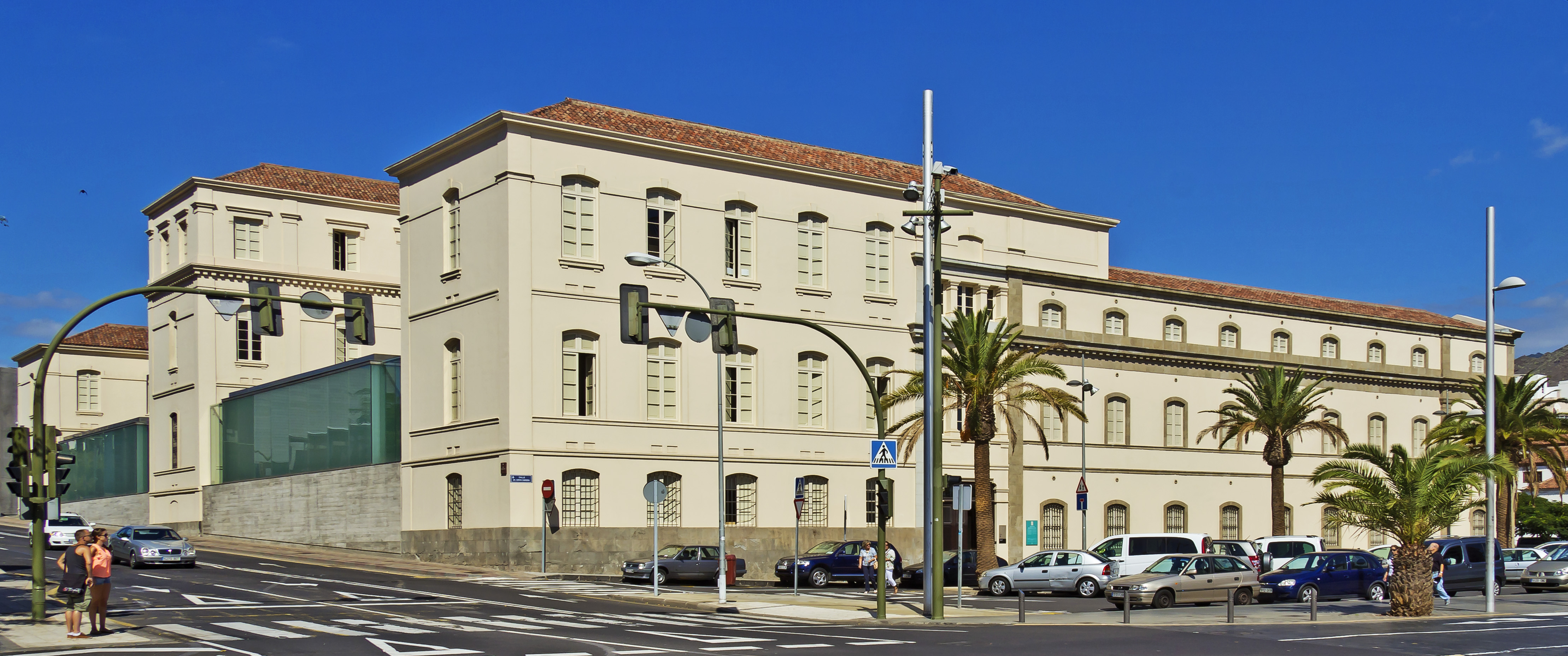 Das Gebäude wurde als „Hospital de los Desemparados“ von Manuel de Oraá entworfen. Es wurde 1895 fertiggestellt. Es wird heute als „Museo de la Naturaleza y el Hombre“ genutzt. Ansicht von Südosten